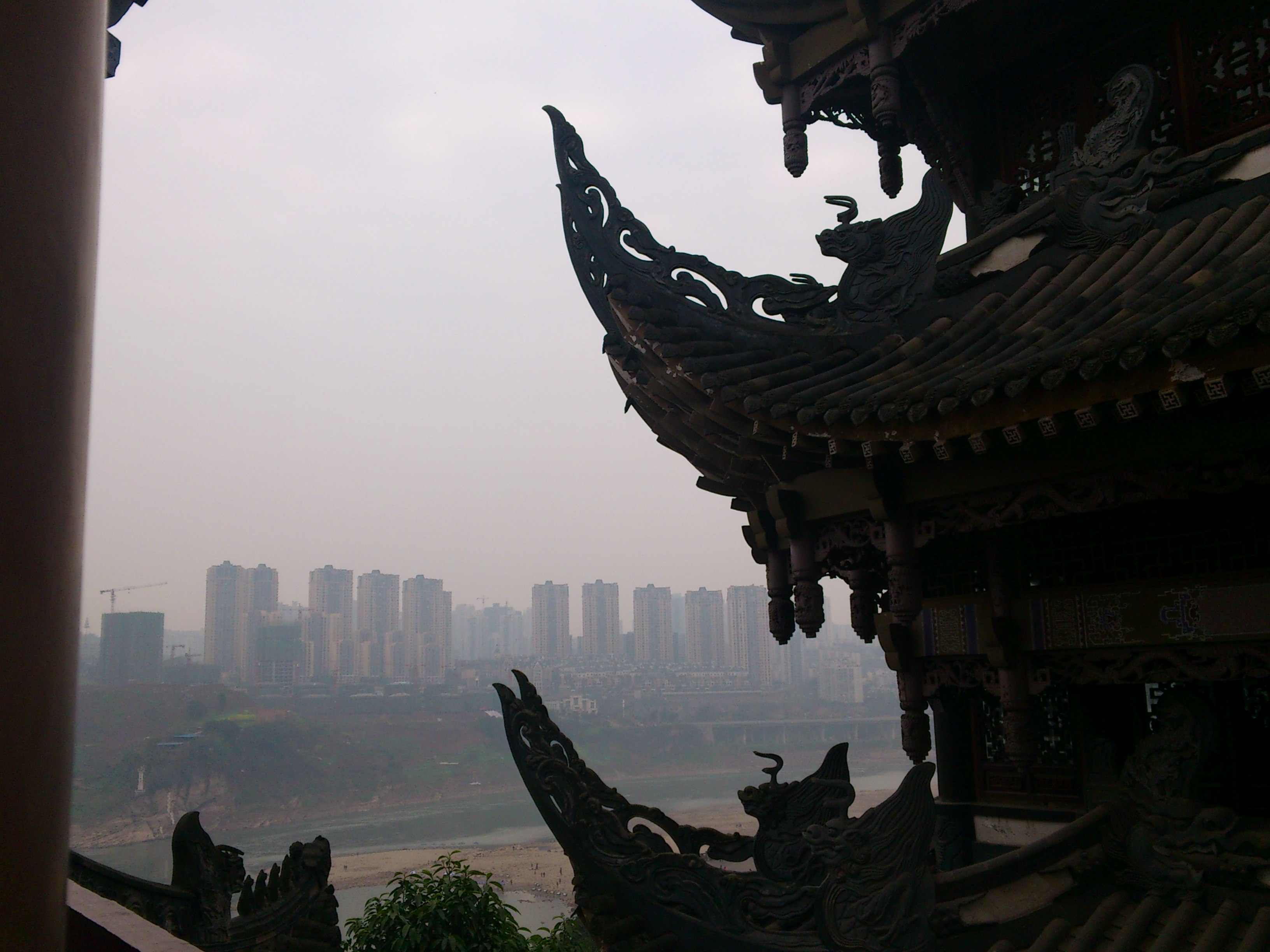 中文（中国大陆）: 宝轮寺一瞥